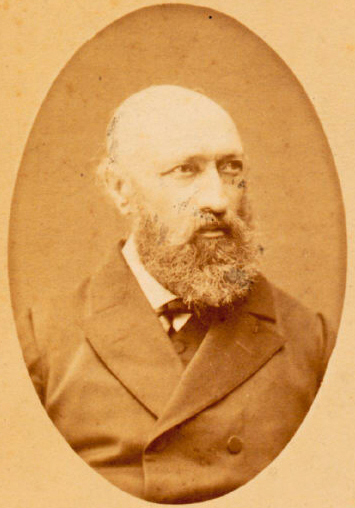 Louis Lacombe (1818-1884), French pianist & composer